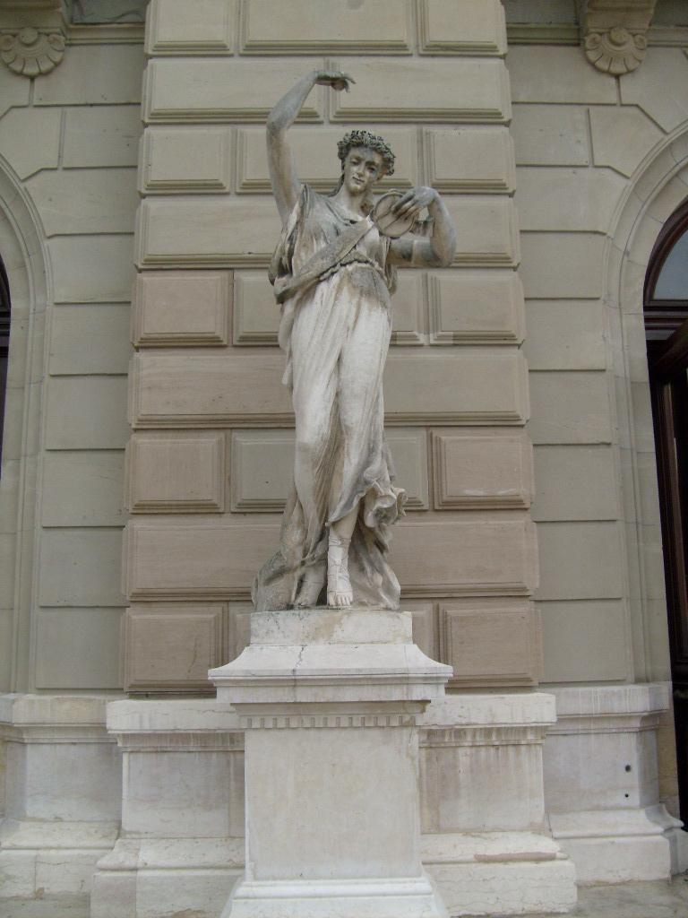 Statue de marbre représentant la Danse sur l'avant-perron du Grand Théâtre de Genève